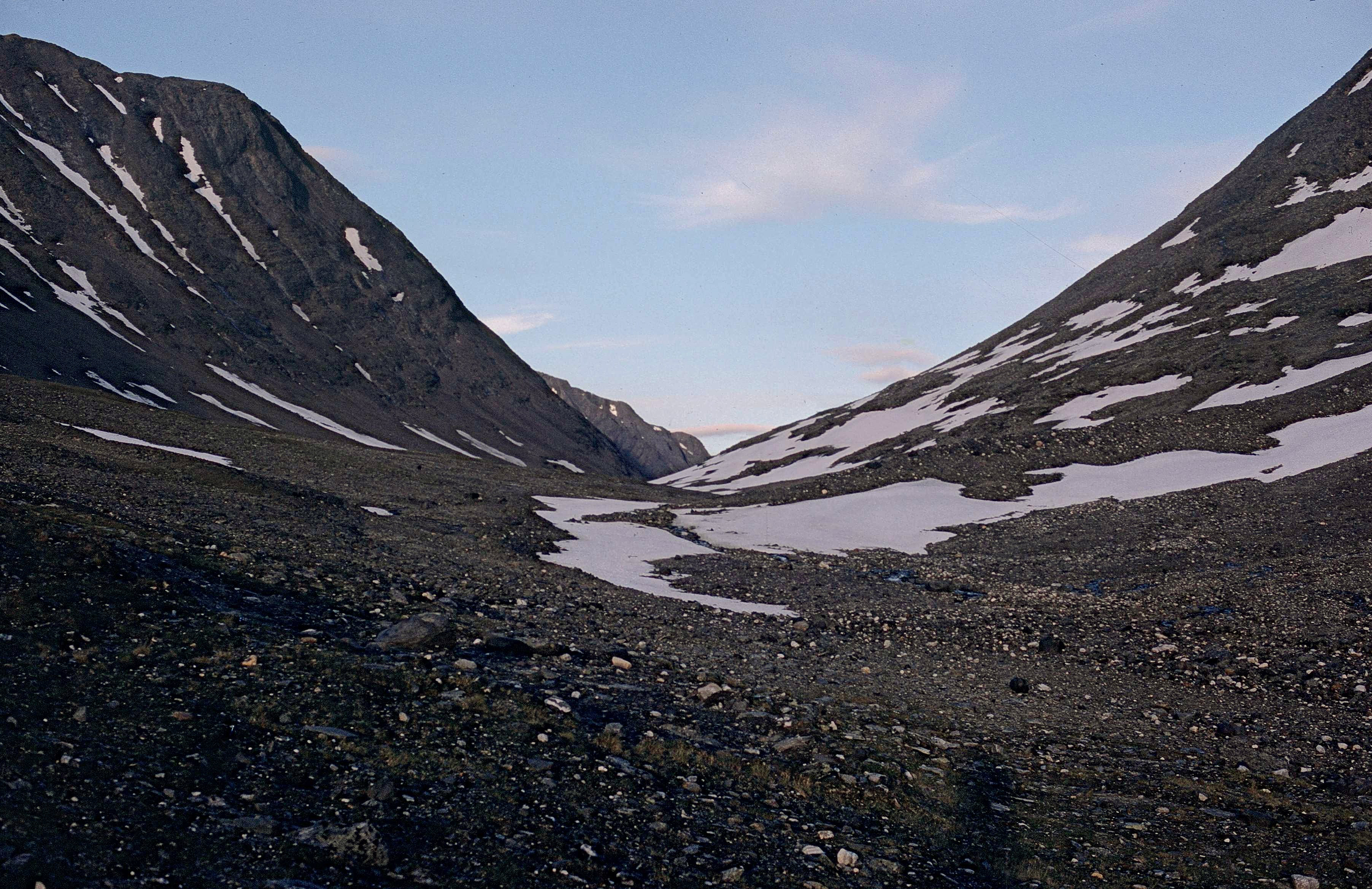 Neitarieppvagge i Sarek